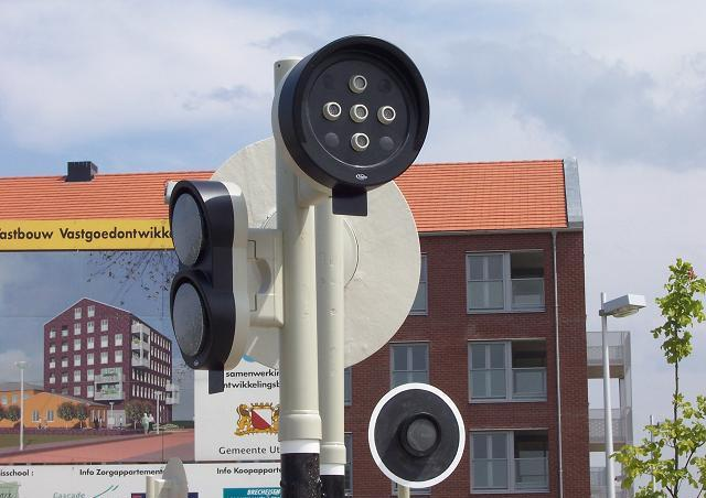 Verkeerslichtbeïnvloeding voor HOV bus te Parkwijk, Utrecht